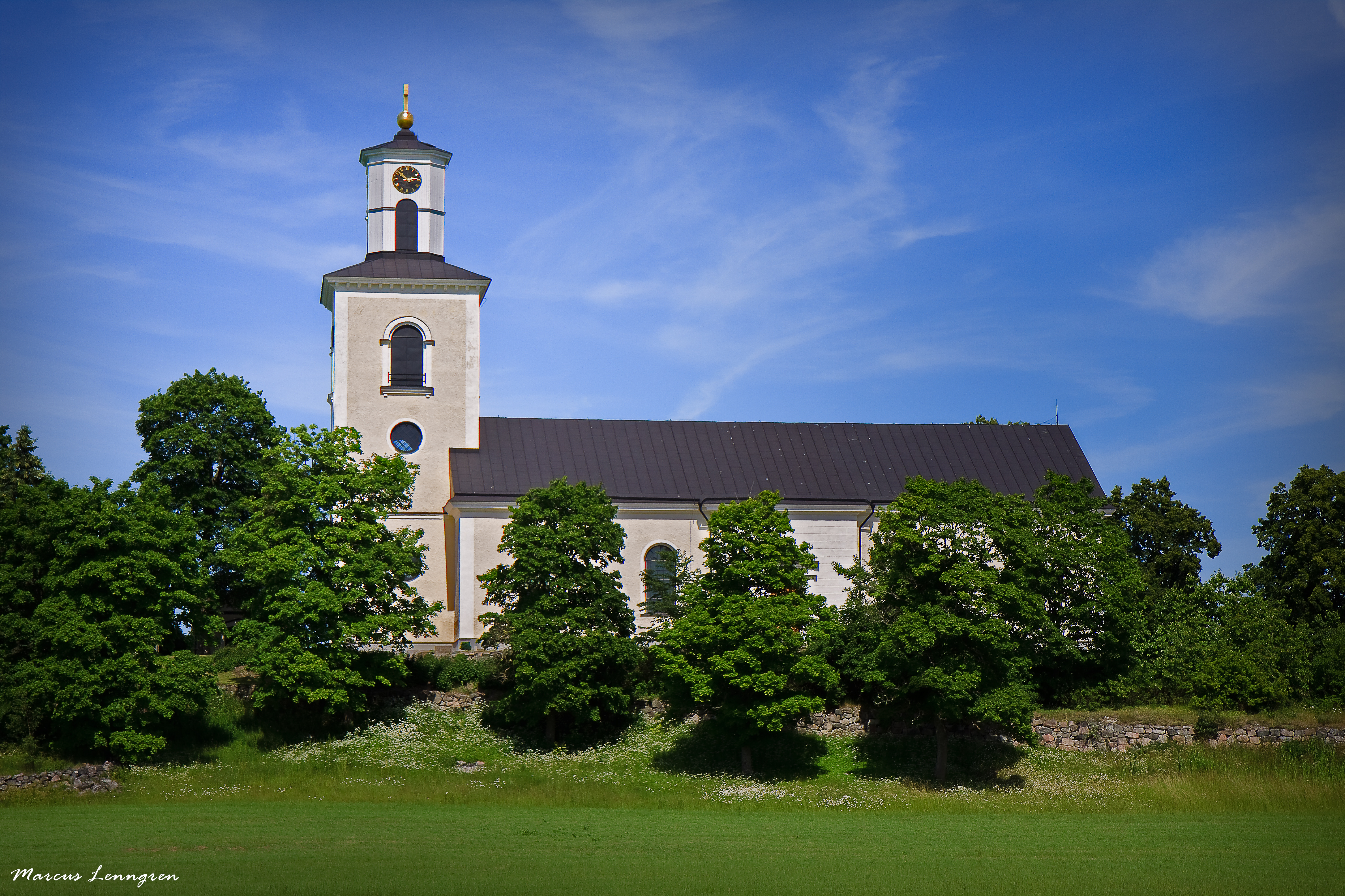 Kuddby Kyrka